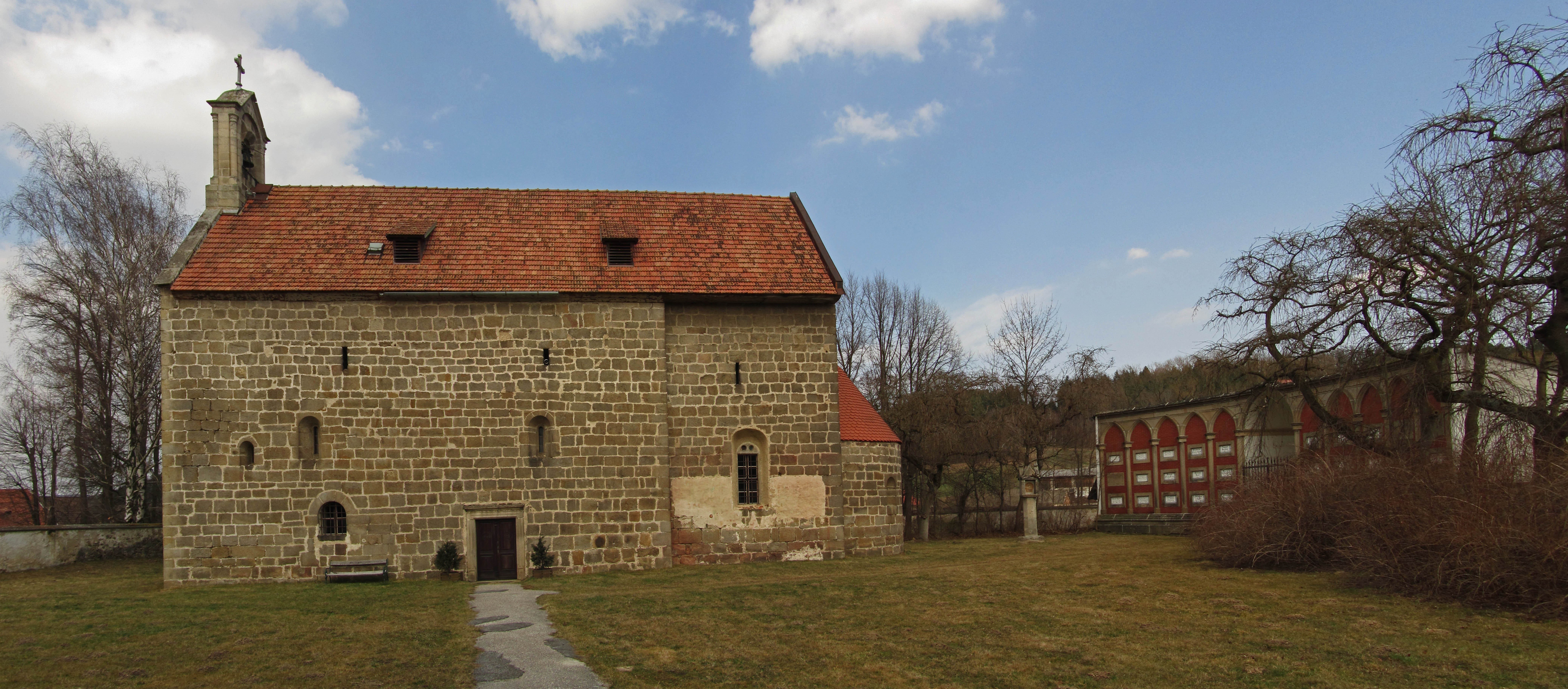 Kath. Filialkirche hll. Peter und Paul mit ehem. Friedhof